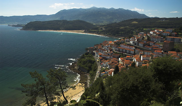 Vista de Lastres desde el mirador del faro. Lastres, Asturias 22 de agosto del 2006Lastres